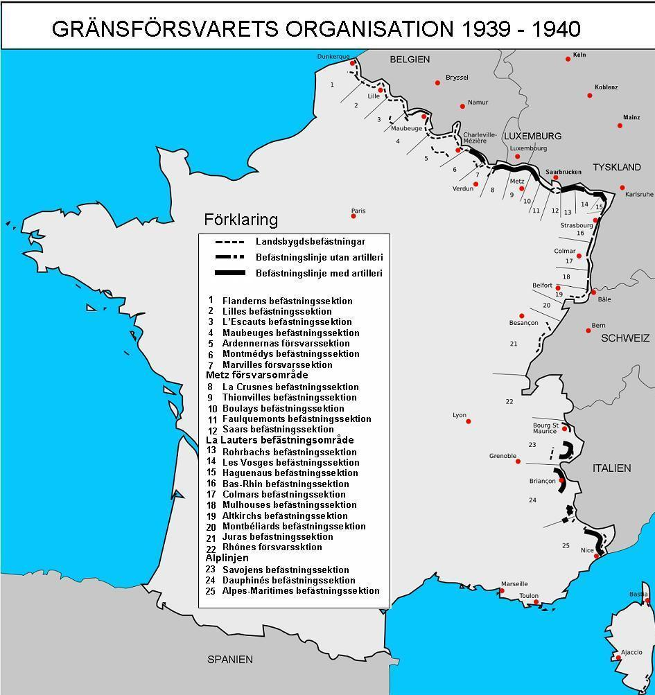 Karta över Maginotlinjen